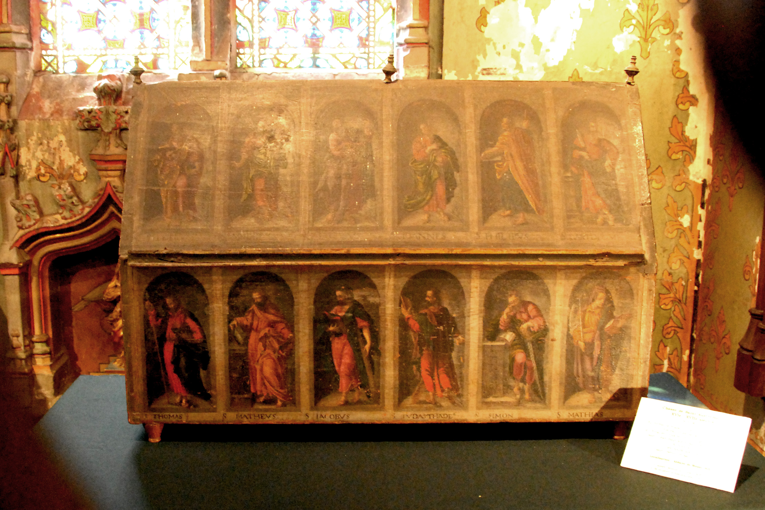 Mozac, Schrein des hl. Austremonius